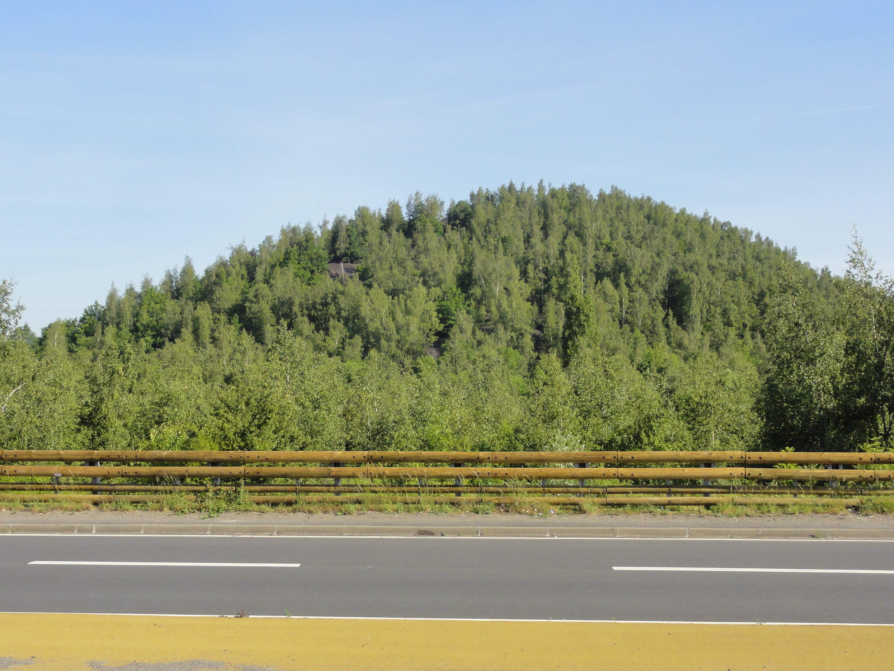 Terril n° 107 dit 4 d'Oignies, Fosse n° 4 de la Compagnie des mines d'Ostricourt, Carvin, Pas-de-Calais, Nord-Pas-de-Calais, France.